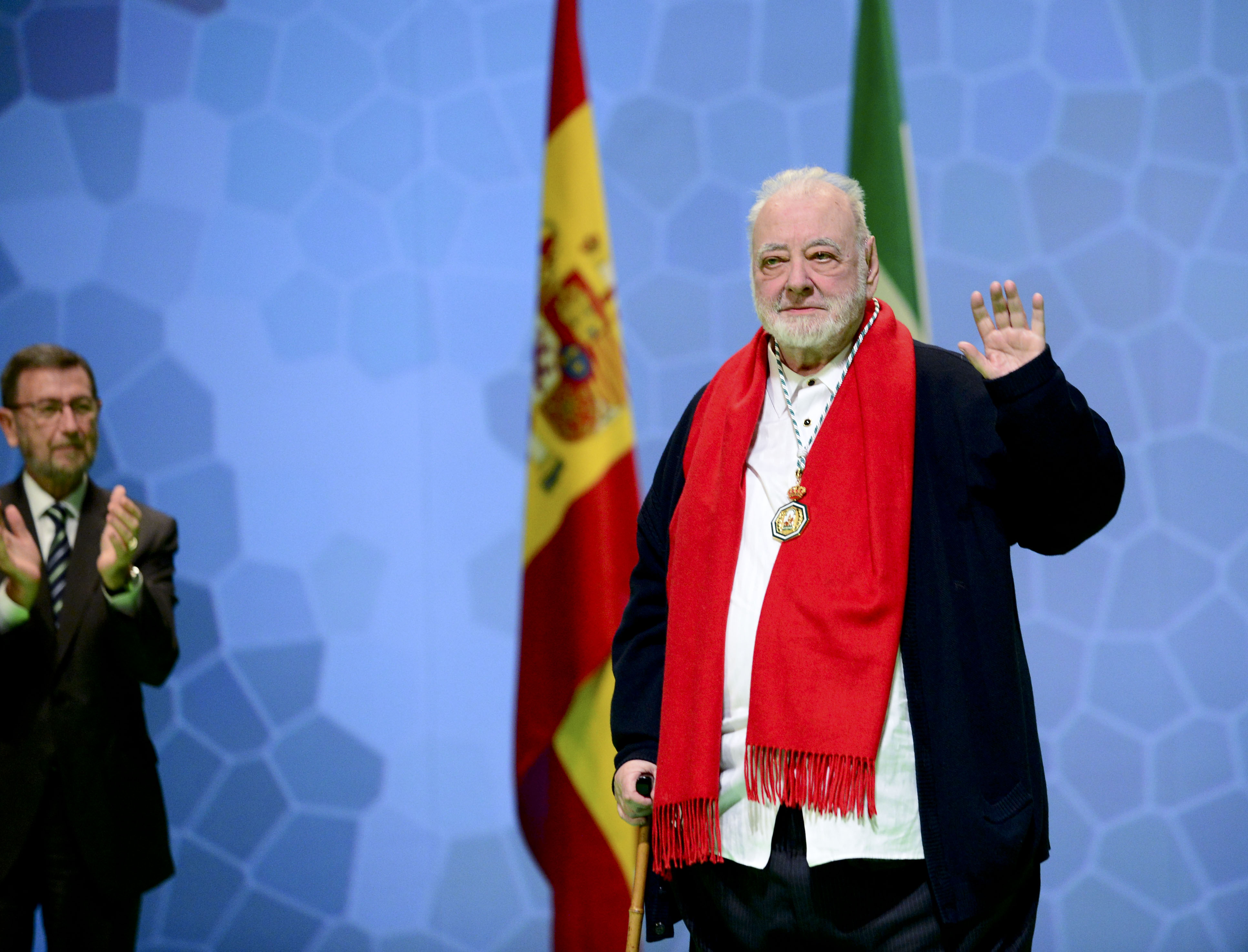 Miguel Picazo en 2014